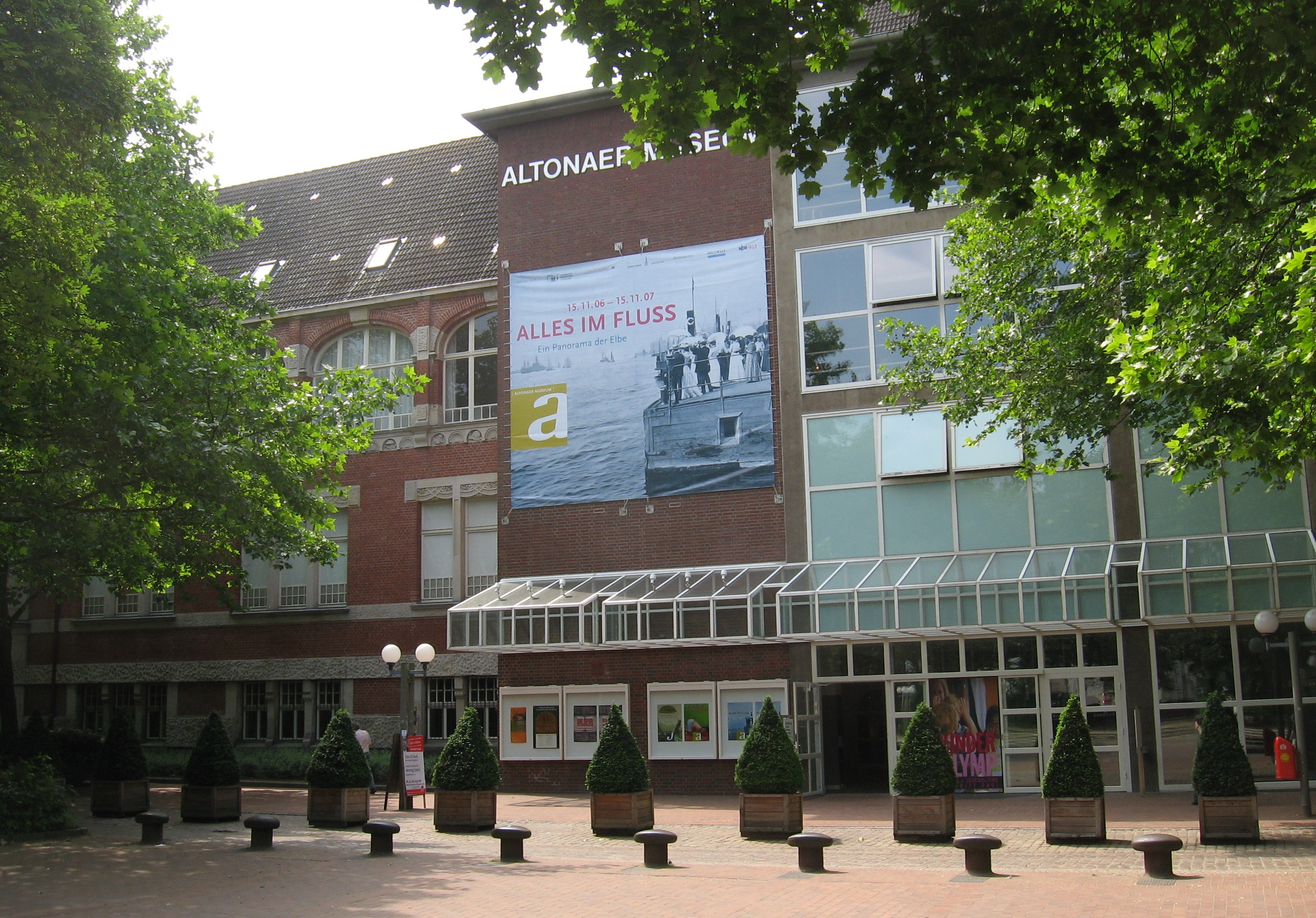 Eingang des Altonaer Museums an der Museumstraße in Hamburg-Altona vor dem Umbau im Herbst 2009